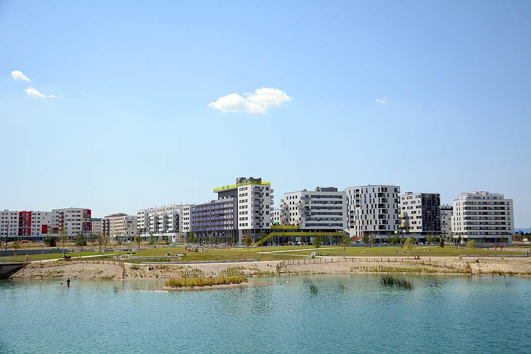 Seestadt Aspern, Wien (17.7.2015)